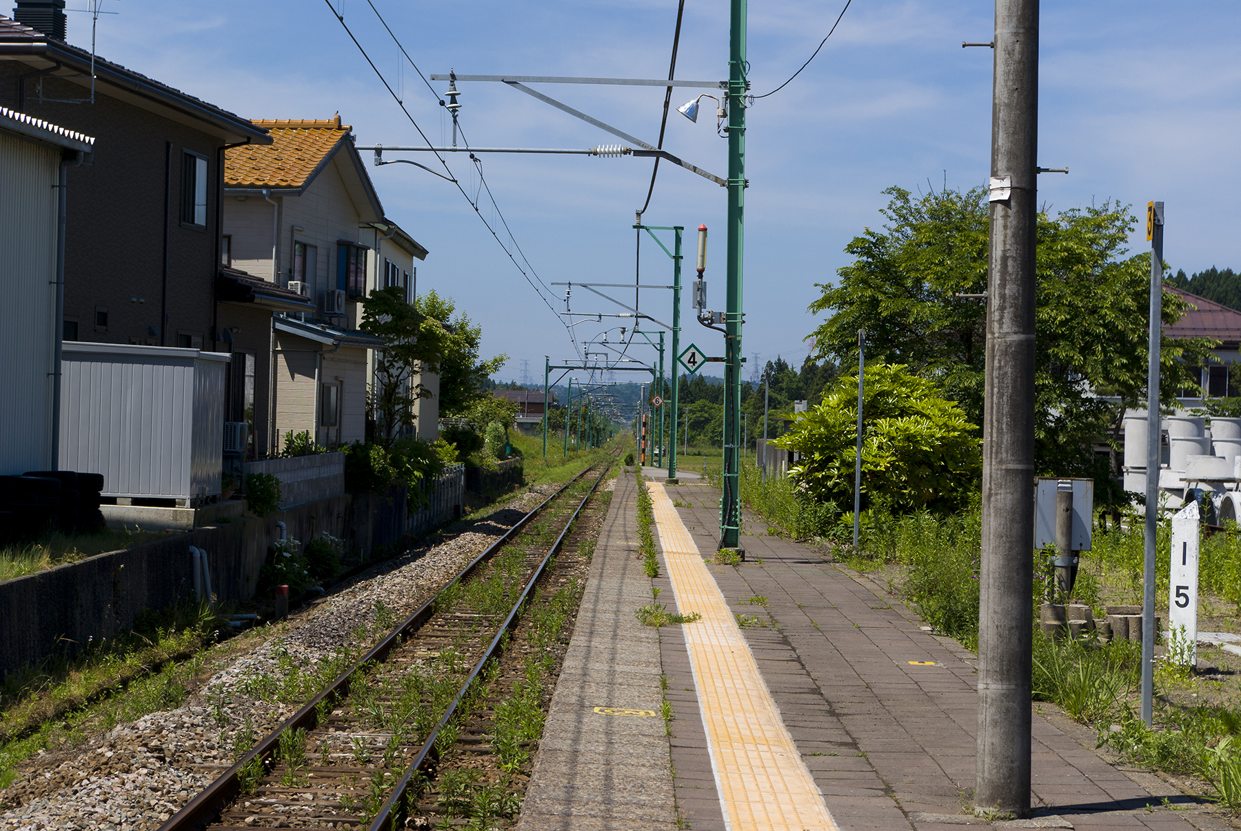 東日本旅客鉄道株式会社越後線礼拝駅